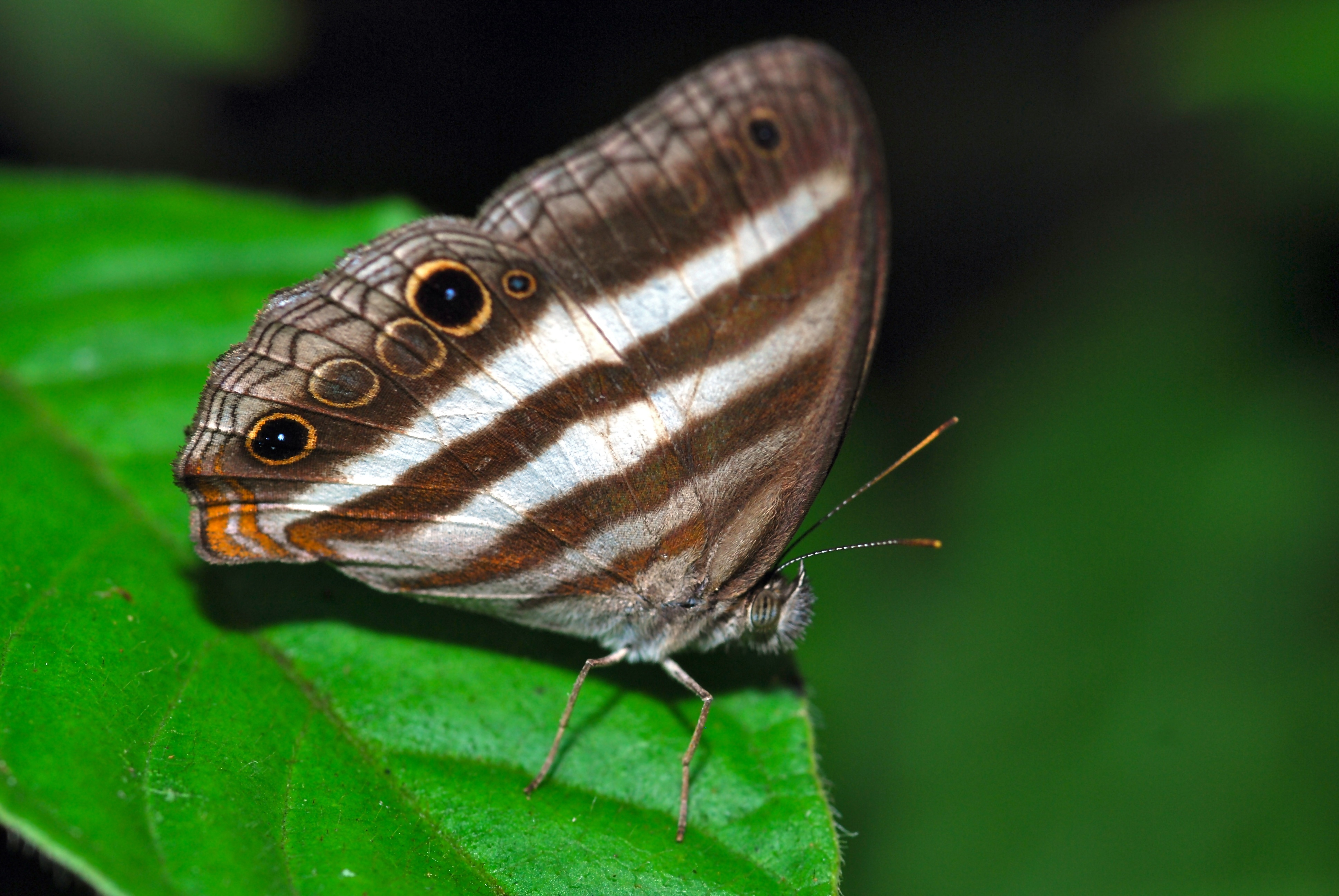 Tikal NP, GUATEMALA